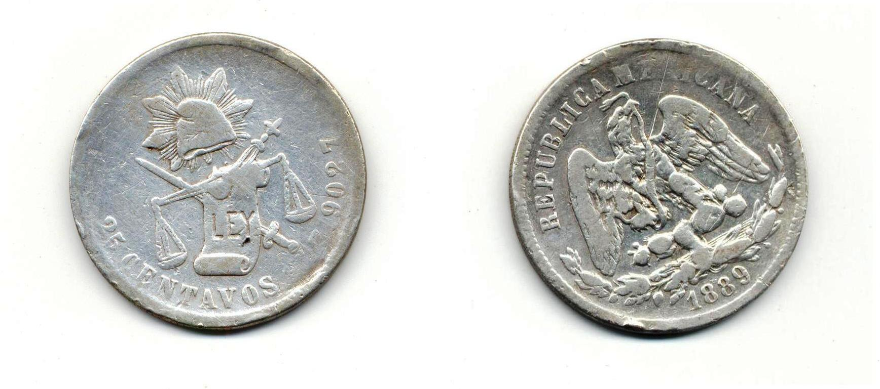 Moneda de 25 centavos acuñada en la ceca de Zacatecas en 1889.